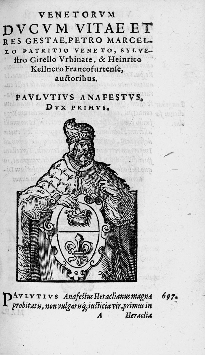 Pietro Marcello, Silvester Girellus, Heinrich Kellner: De vita, moribus, et rebus gestis omnium ducum Venetorum, Holzschnitt von Jost Amman. Frankfurt, Paul Reffeler für Sigismund Feyerabend, 1574